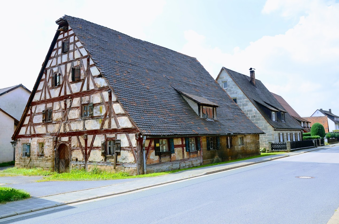 Winkelhaid - historische Ortsreste entlang der Richthausener Straße (2017)